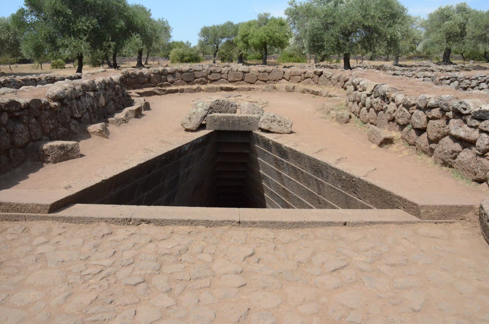 Santa Cristina Pozzo Sacro Esterno